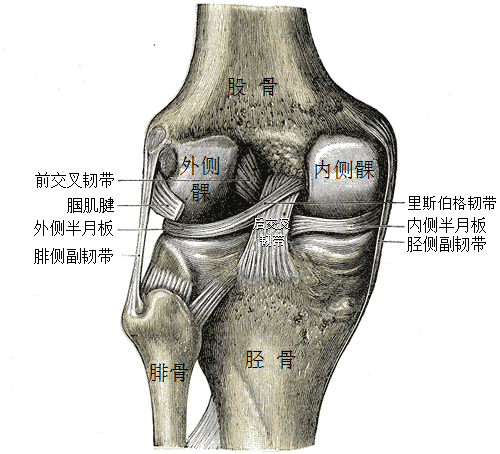 左膝后侧，可见半月板及数条韧带。